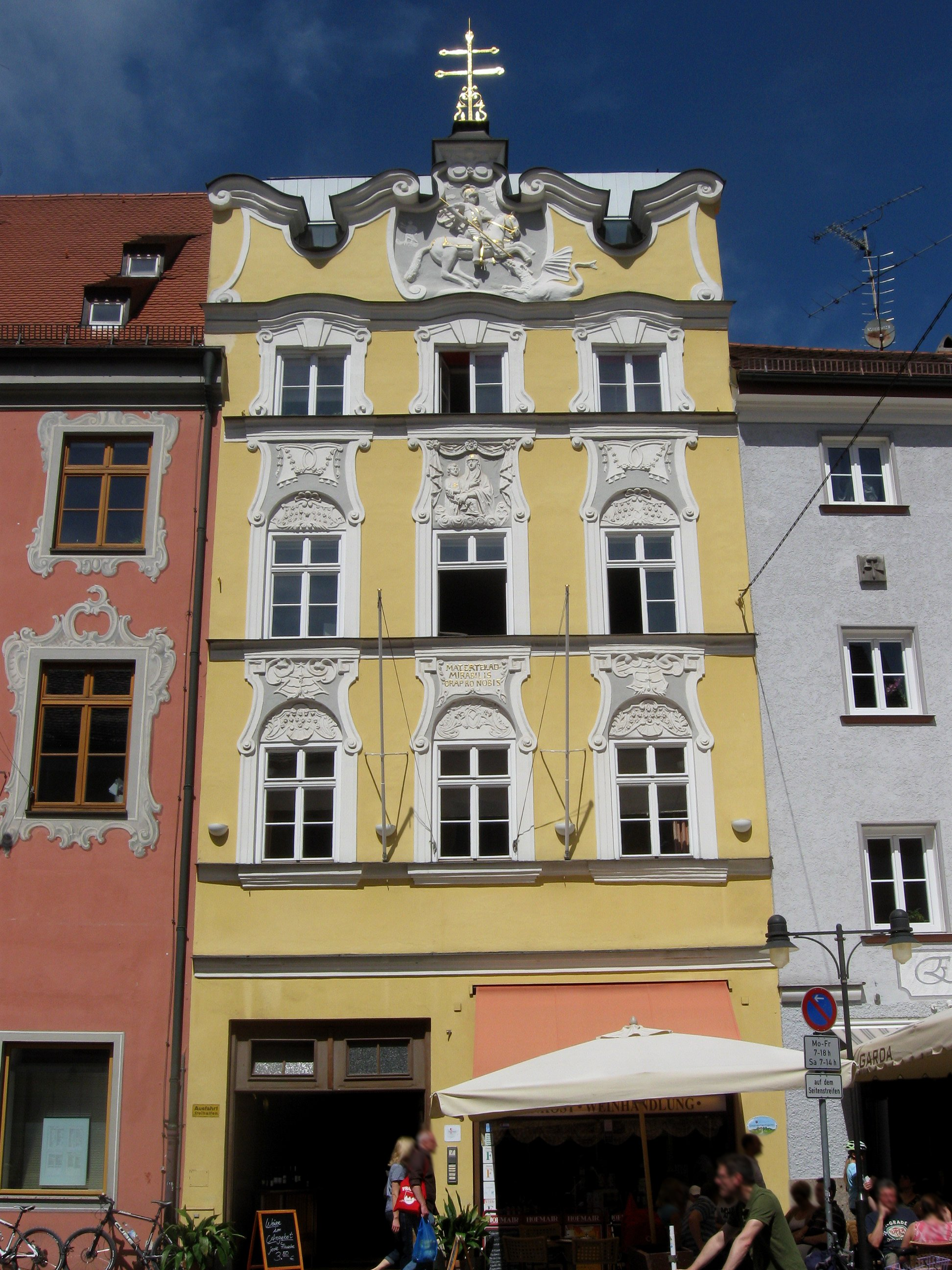 Untere Hauptstraße 7; ehem. Domherrenhaus, viergeschossiger Traufseitbau mit Schweifgiebel und aufwändiger Stuckdekoration, um 1725-30. D-1-78-124-207